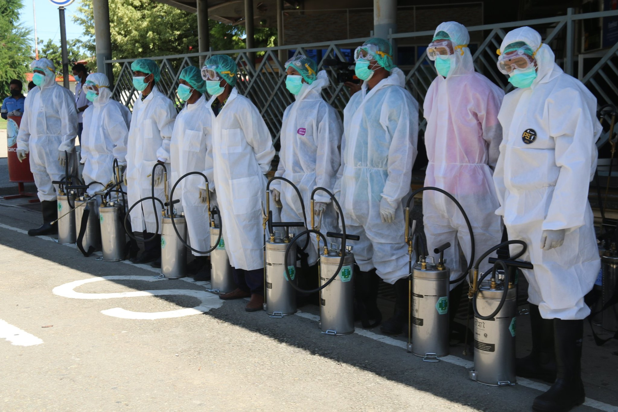 Desinfektionsaktion am Flughafen Dili